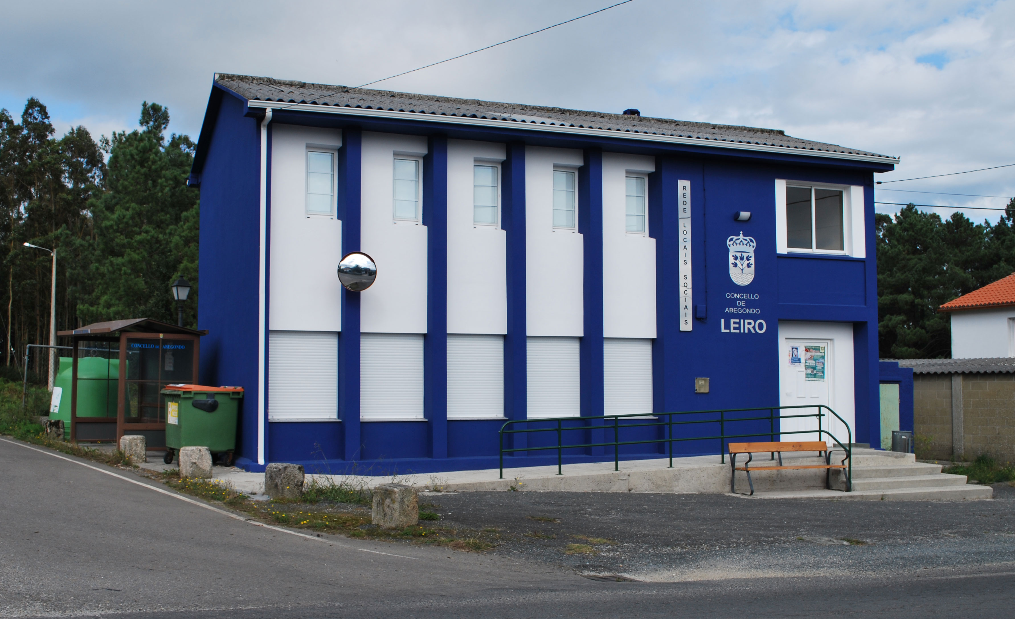 Leiro Concello de Abegondo A Coruña Galiza Spain